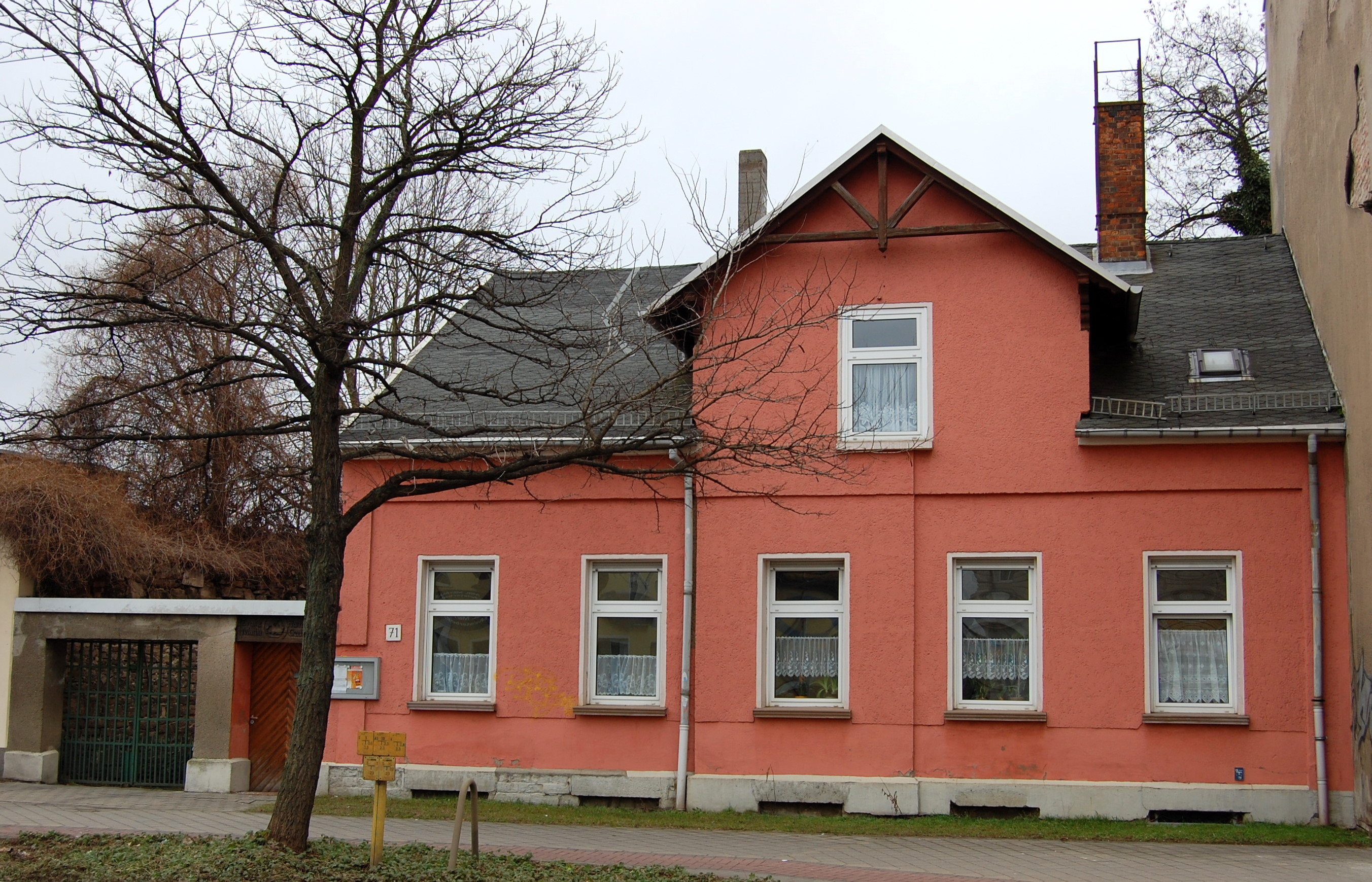 Alt Fermersleben 71, Gemeindehaus der Martin-Gallus-Kirche